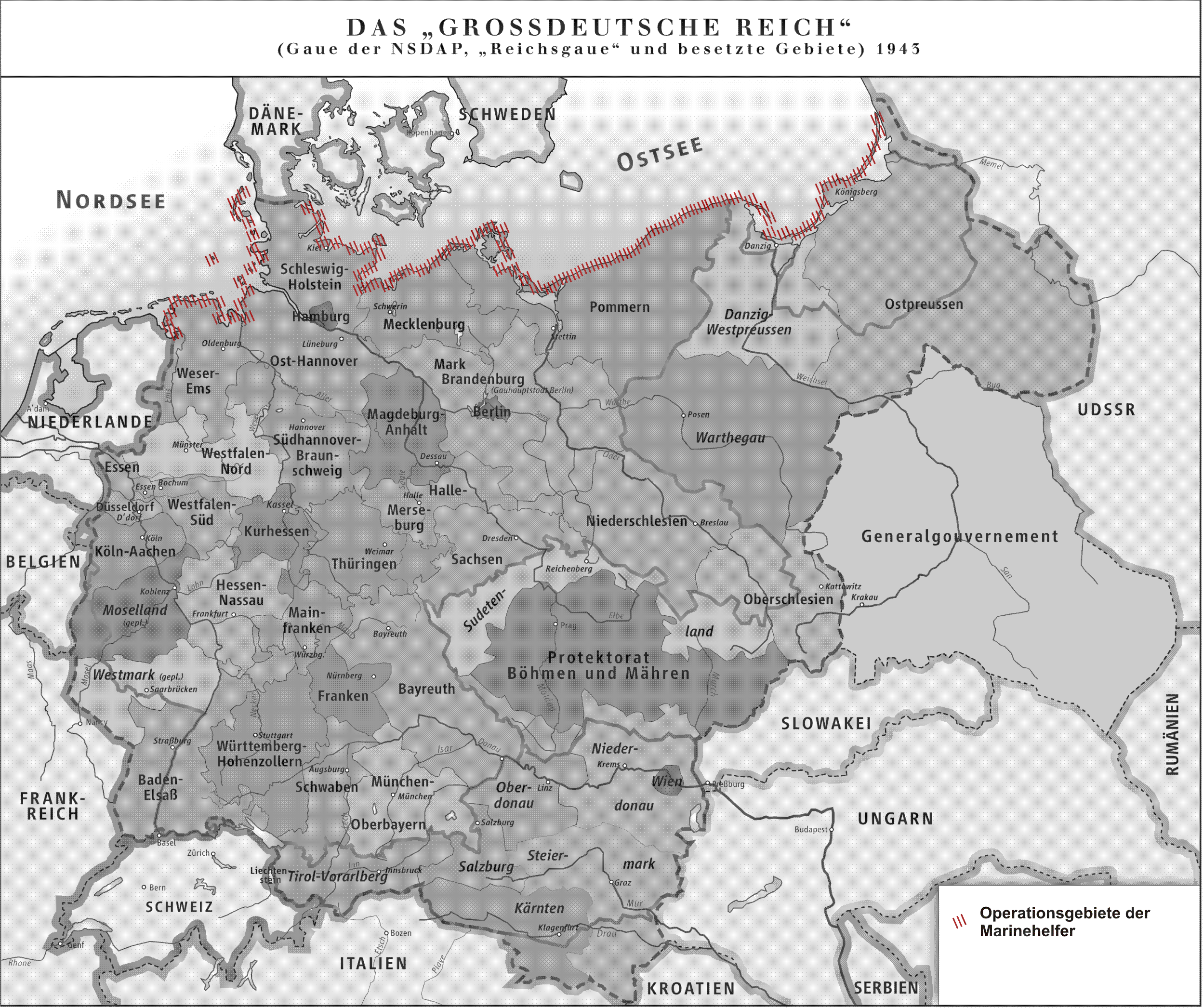 Karte des „Großdeutschen Reiches“ 1943. An der Küste dargestellt das Operationsgebiet der Marinehelfer